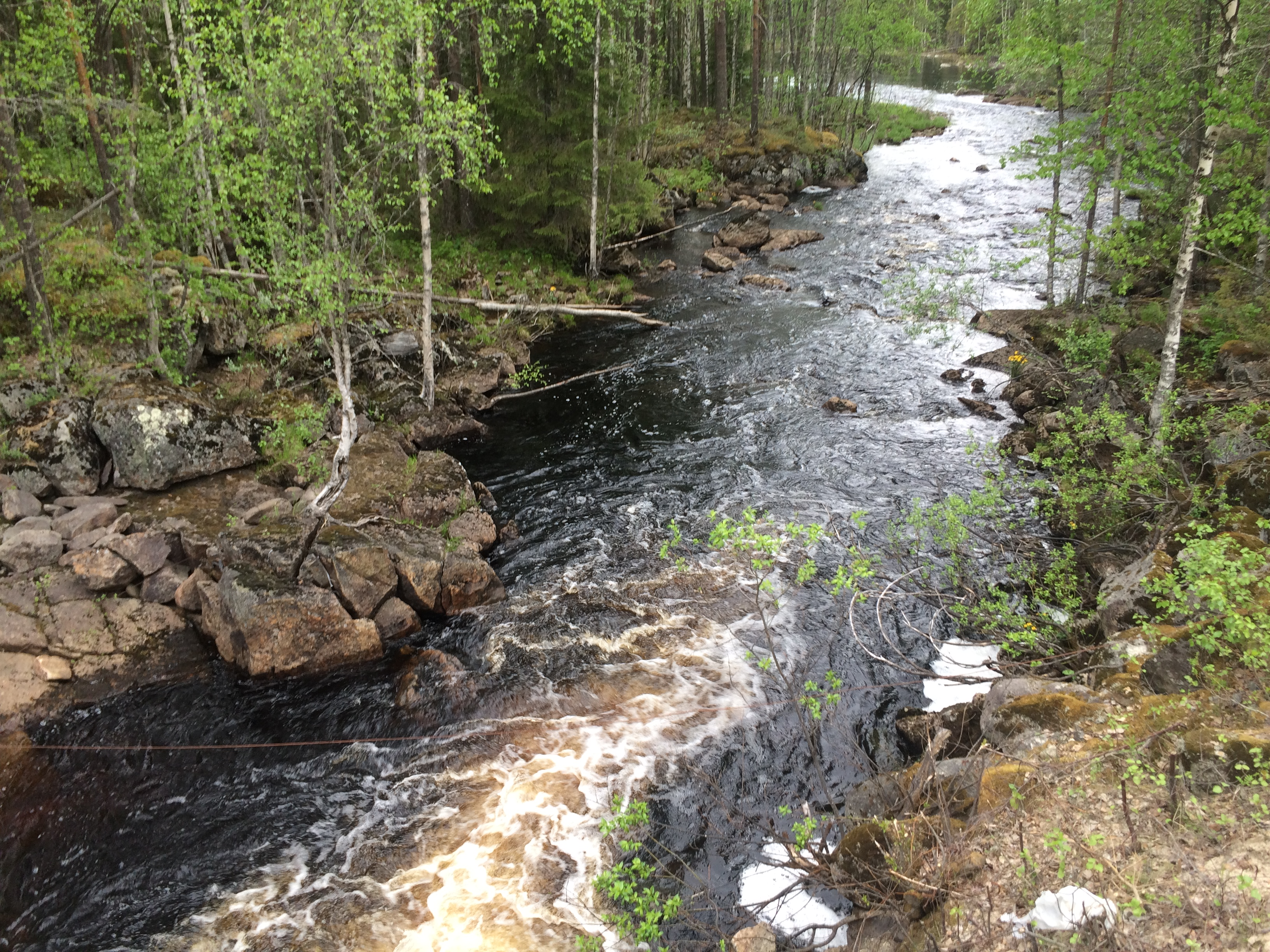 Таракшинойоки